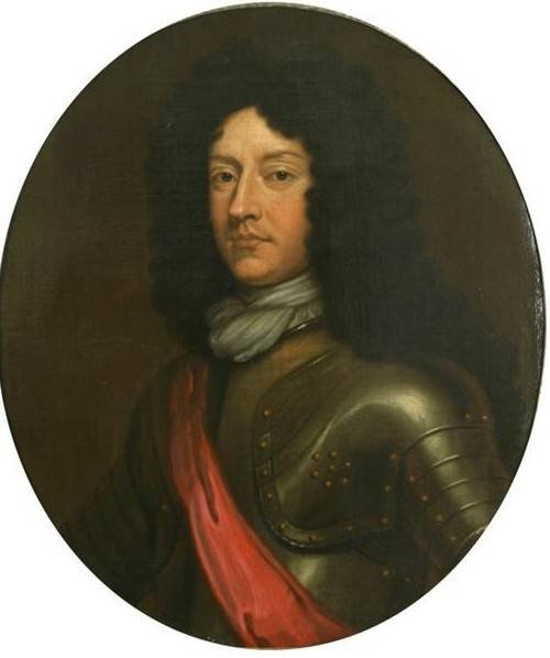 Portrait of Lieutenant General George Ramsay